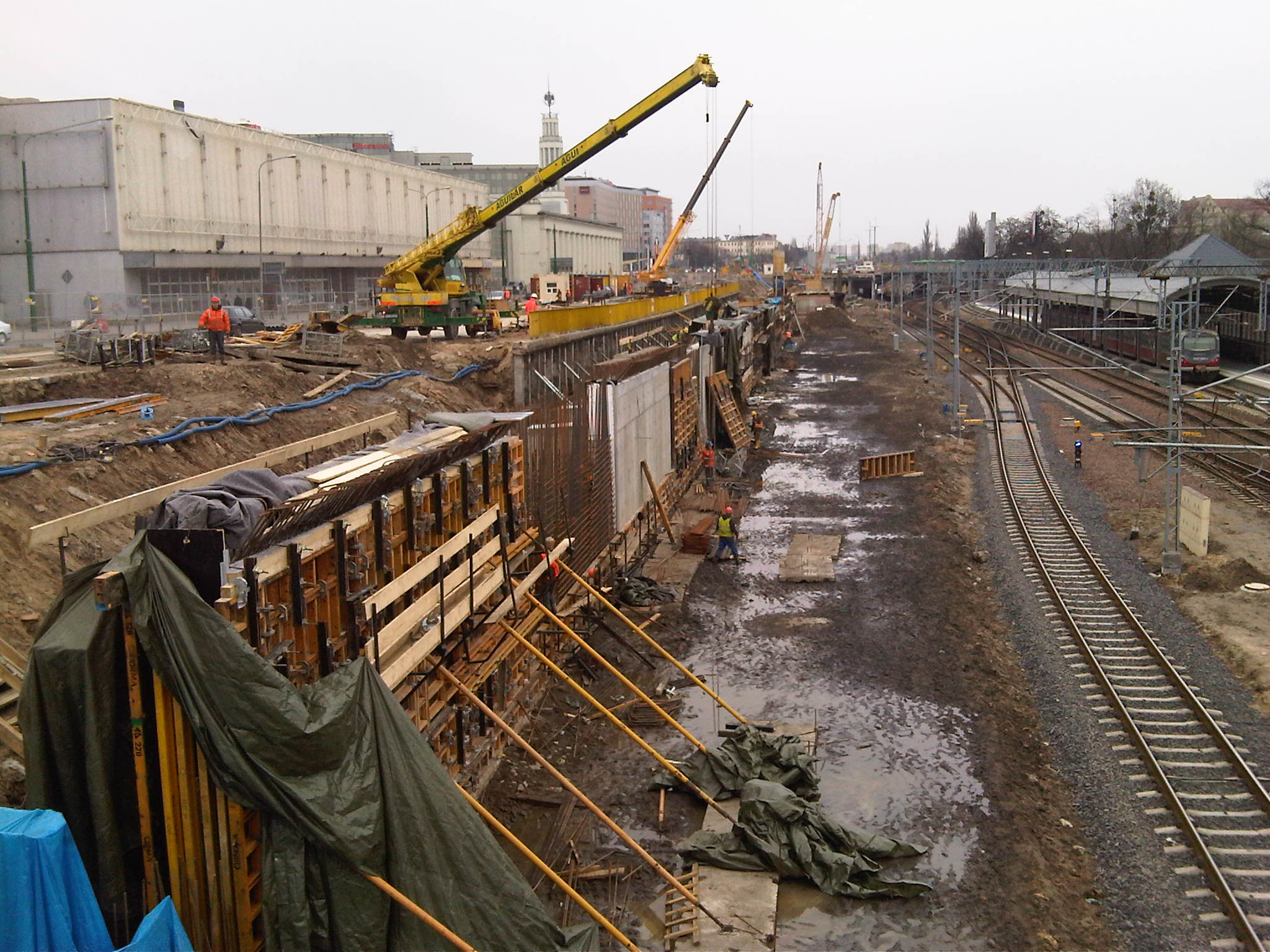 Prace budowlane przy przedłużeniu trasy Poznańskiego Szybkiego Tramwaju (PST) do Dworca Głównego - widok z Mostu Dworcowego wzdłuż ulicy Roosevelta.